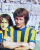 Miguel Ángel Manzi, futbolista de Rosario Central en 1979.